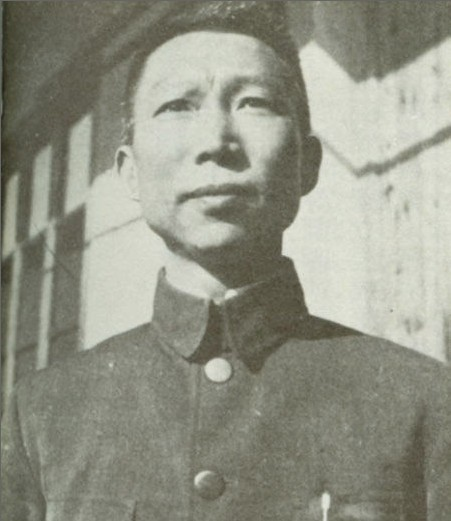 薛岳将军